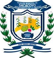 Escudo del Pueblo de Sacacoyo